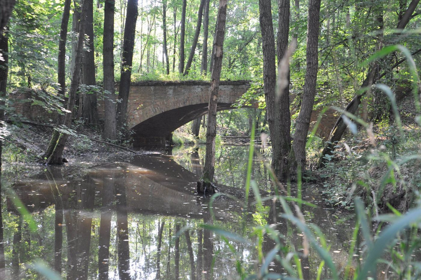 Widok na most prowadzący na wyspę stanowiącą centrum wioski